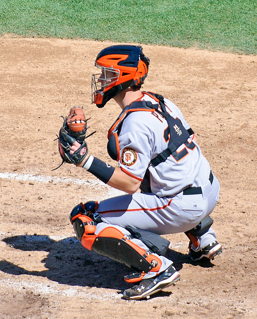 Buster Posey